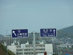 札樽自動車道 小樽インターチェンジの出口から撮影